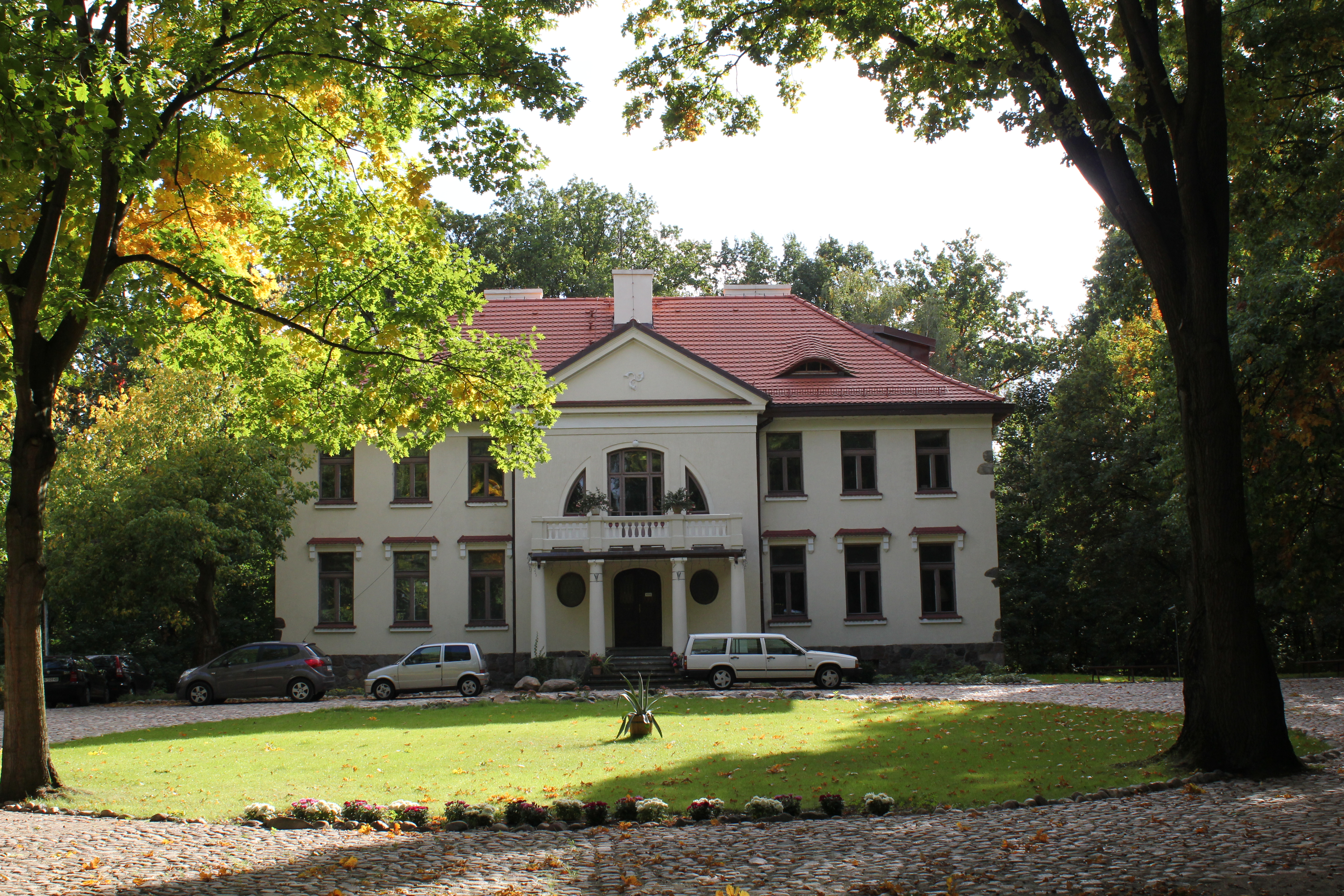 nr rejestrowy zabytku 1108/764 z 22.02.1967 Willa Jarosława Iwaszkiewicza w Stawisku Podkowa Leśna, ul Gołębia